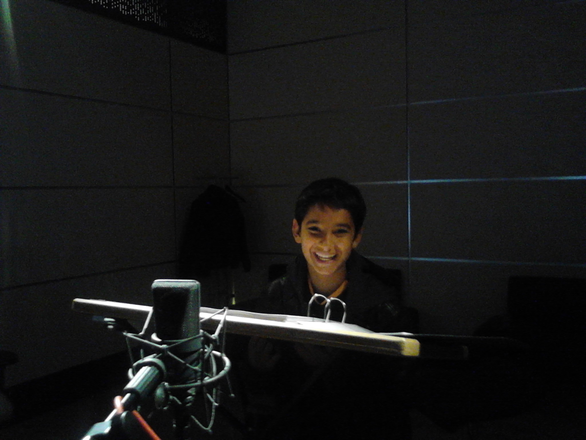 Nicolas bei den Synchronarbeiten zu "Life of Pi" ("Schiffbruch mit Tiger")